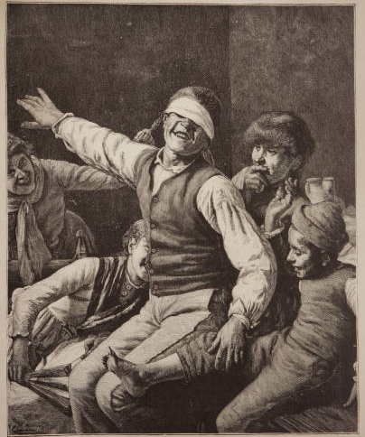 Ilustració Catalana, primera època, número 181 Data: 31 de gener de 1888 pàg. 28